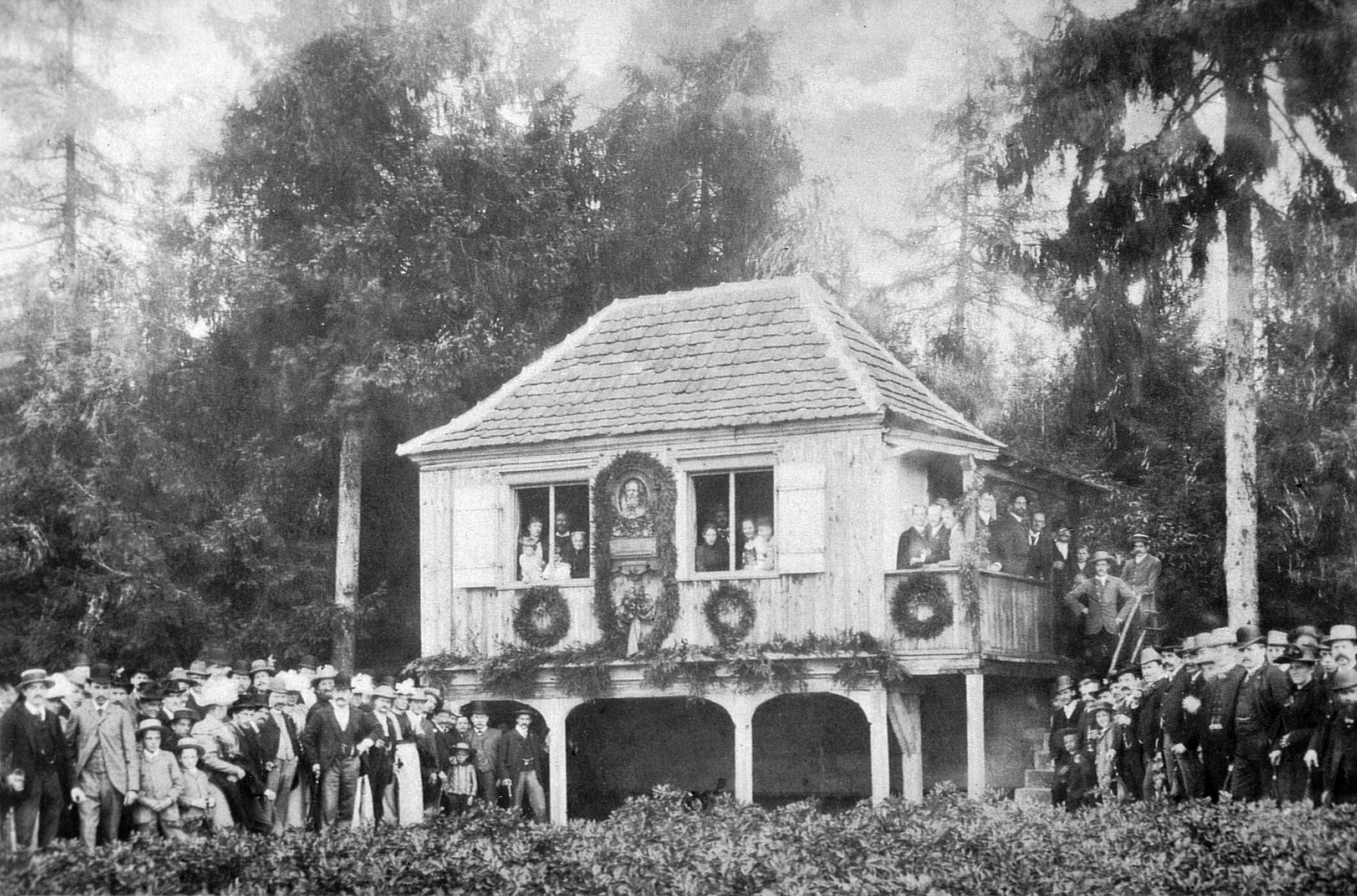 Treffen sozialdemokratischer Gesangsvereine aus Stuttgart, Cannstatt und Esslingen